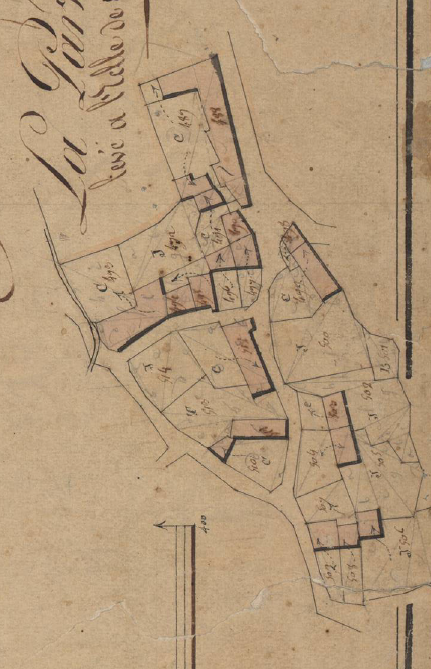 La Part Petita, d'Angostrina, en el Cadastre Napoleònic del 1812 (Arxius Departamentals dels Pirineus Orientals)